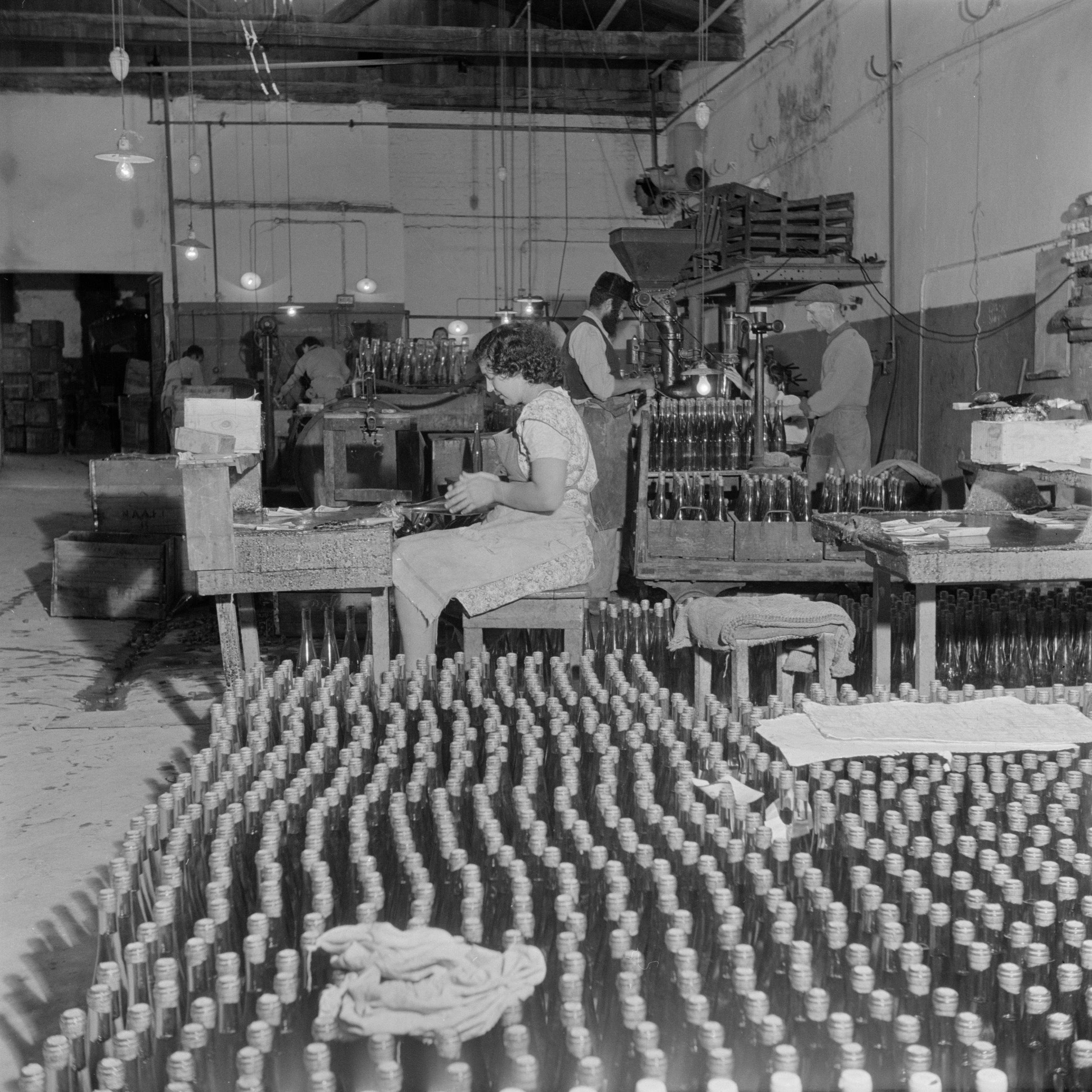 Collectie / Archief : Fotocollectie Van de Poll Reportage / Serie : Israel 1948-1949:Rishon LeZion Beschrijving : Arbeiders bezig met het etiketteren van wijnflessen in de Rothschild wijnkelders te Rishon LeZion Datum : 1948 Locatie : Israël, Rishon LeZion Trefwoorden : arbeiders, bottelarijen, etiketten, fabrieken, flessen, industrie, wijnbouw, wijnkelders Persoonsnaam : Rothschild, James de Fotograaf : Poll, Willem van de Auteursrechthebbende : Nationaal Archief Materiaalsoort : Negatief (zwart/wit) Nummer archiefinventaris : bekijk toegang 2.24.14.02 Bestanddeelnummer : 255-1608